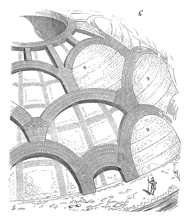 ... Sachant que les Romains, dans leurs constructions, ne font jamais rien qui ne soit motivé, on ne pourrait comprendre pourquoi ces contre-forts T ont été ainsi réservés, s'ils ne devaient pas contribuer d'une manière efficace au maintien de la coupole. Ces contre-forts T ne sont pas disposés au droit des nerfs des caissons; ils ont une fonction distincte; fonction expliquée par le réseau d'enveloppe que représente la figure 6. Pour former ce réseau, la calotte à caissons servait de cintrage, et il suffisait de cerces de bois légères pour bander les arcs appuyés sur l'extrados de cette calotte. Ces arcs bandés, il n'y avait plus qu'à garnir les intervalles avec une maçonnerie (blocage) de matériaux légers, ainsi qu'il est indiqué en B sur la figure 6 ...